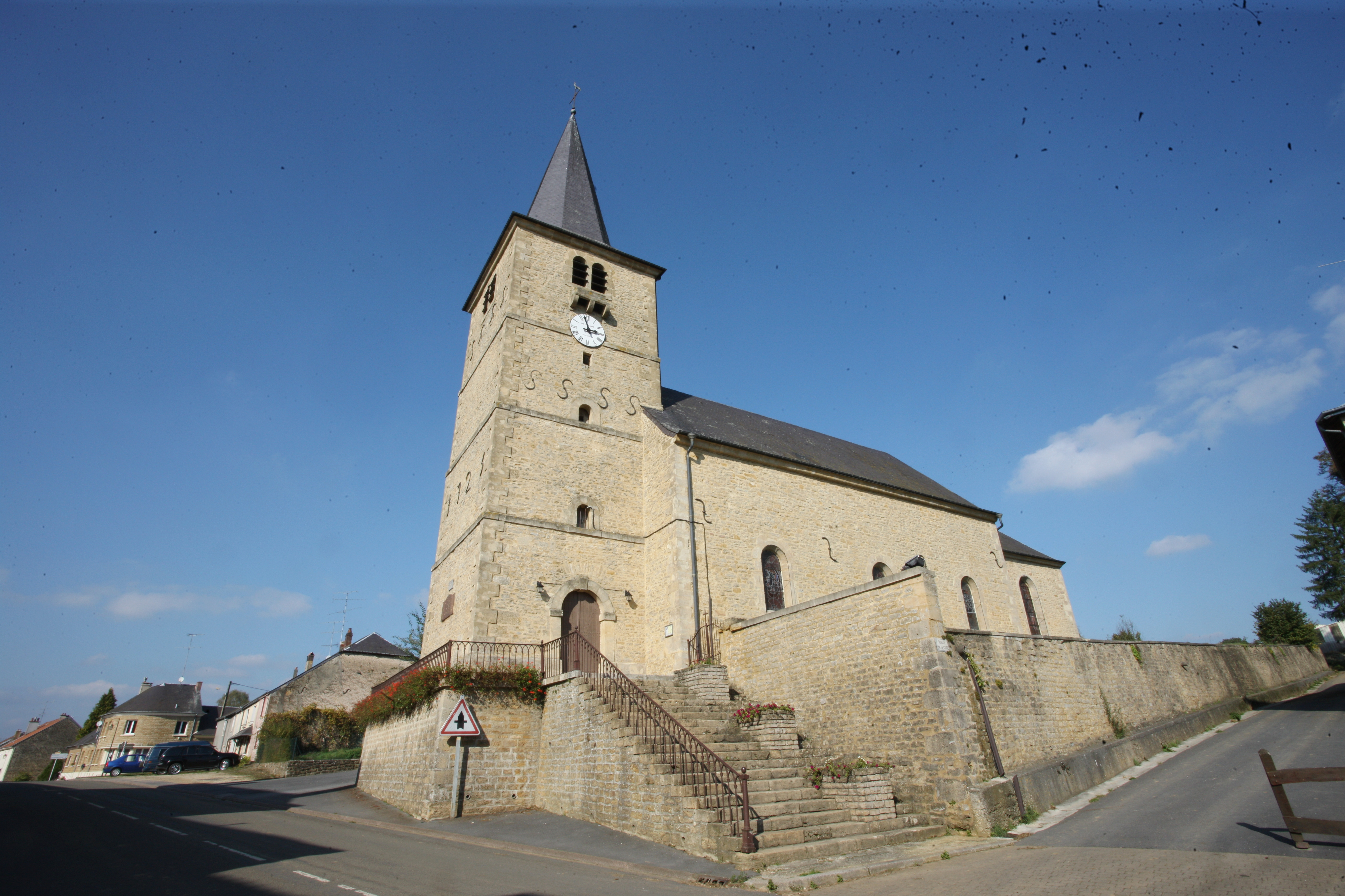 Vilage Ardennais